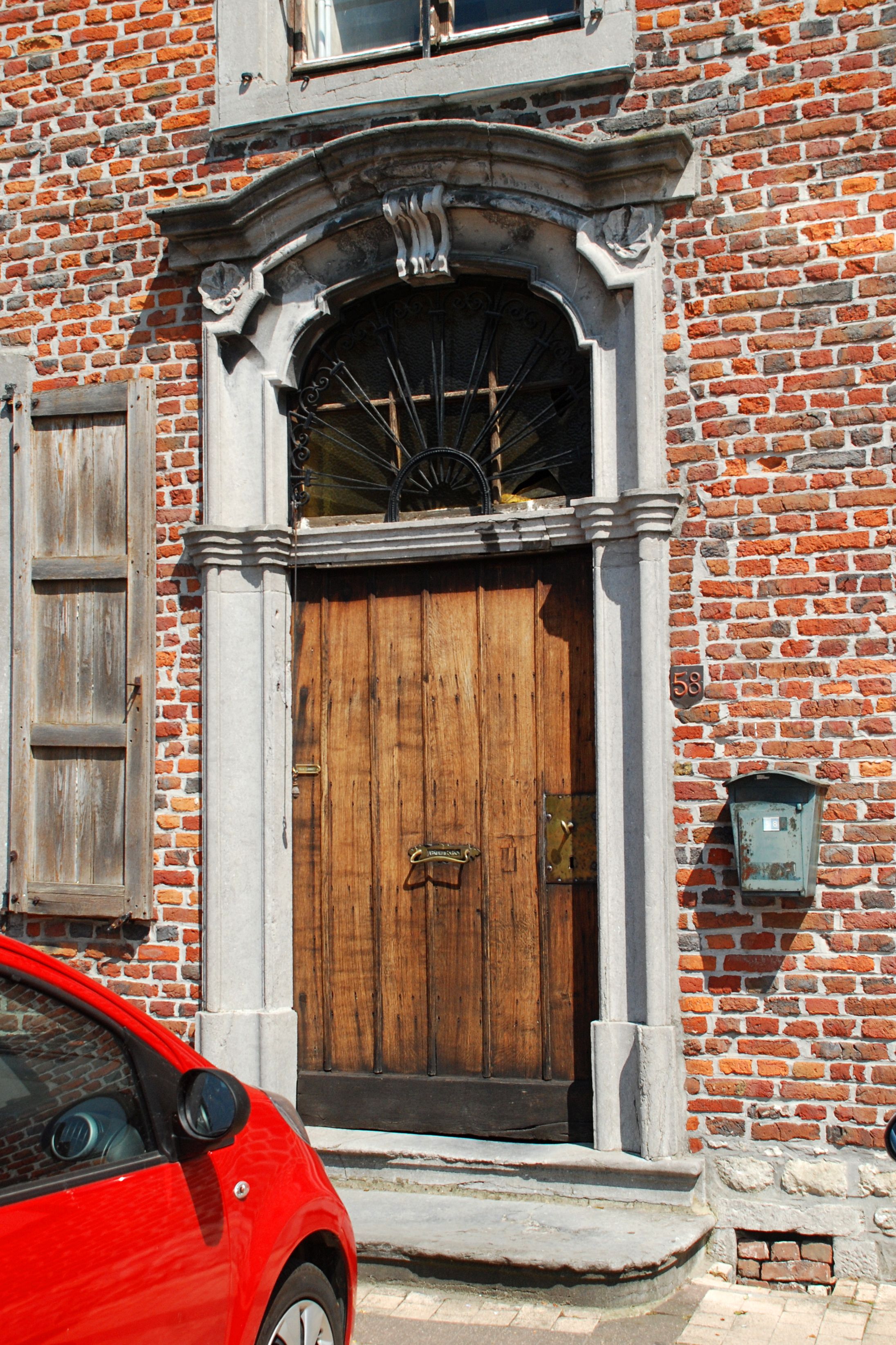 Belgique - Brabant wallon - Genappe - Auberge du Roy d'Espagne - porte de style Louis XV